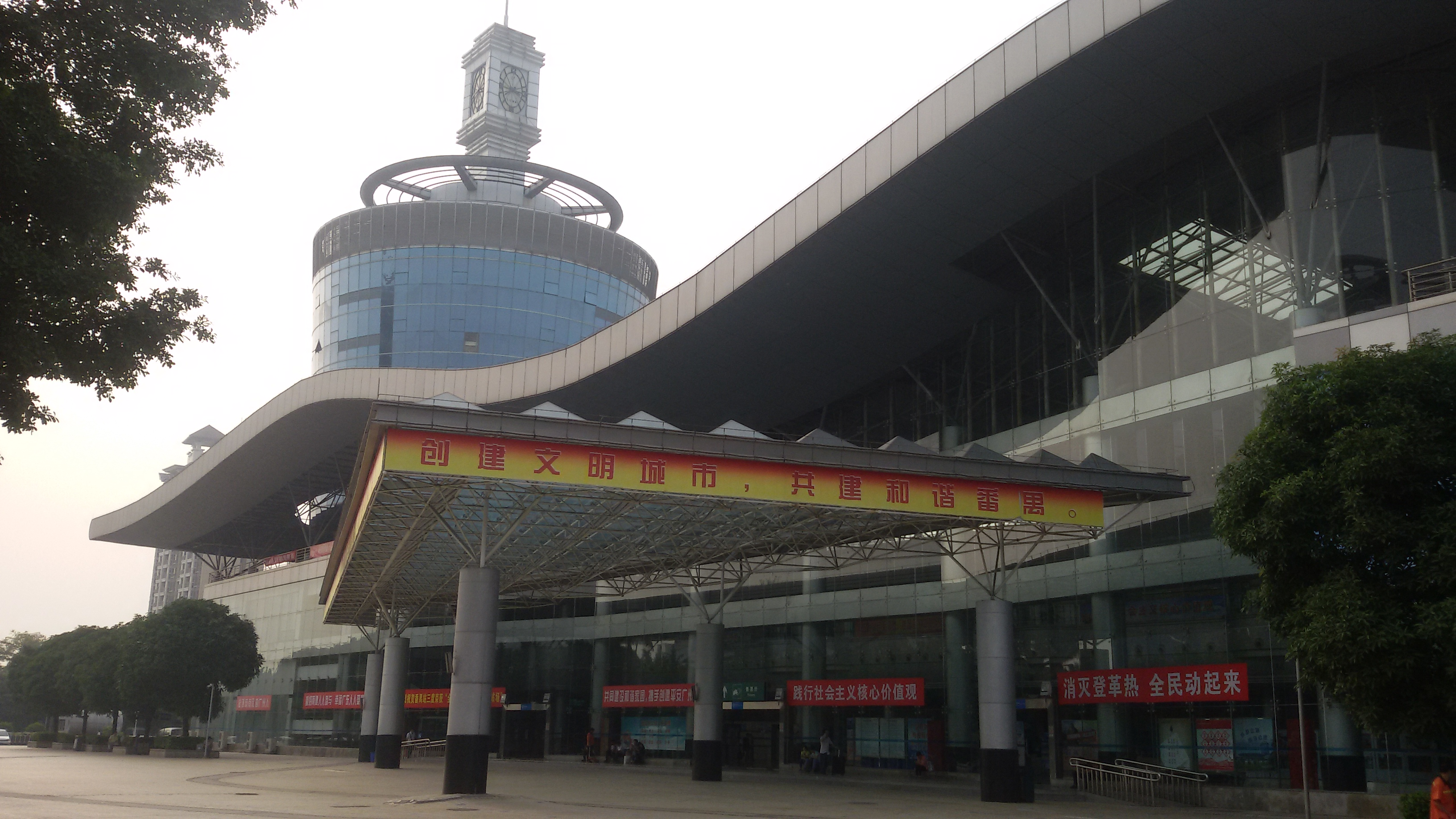 粵語: 番禺汽車客運站